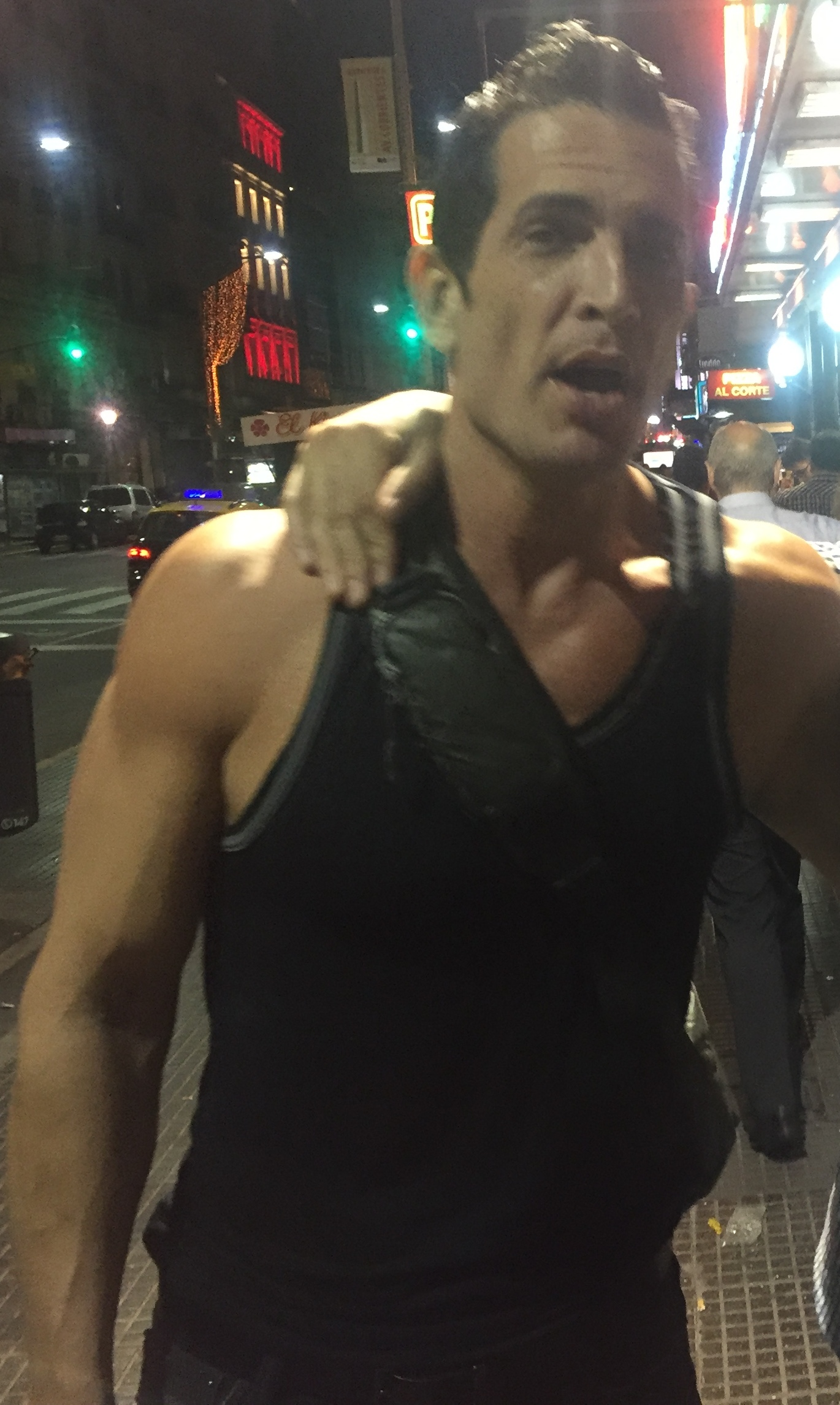 Diego Ramos saliendo del teatro Picadilly, 2017.